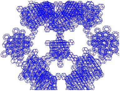 Egy nagygömb néhány lapja